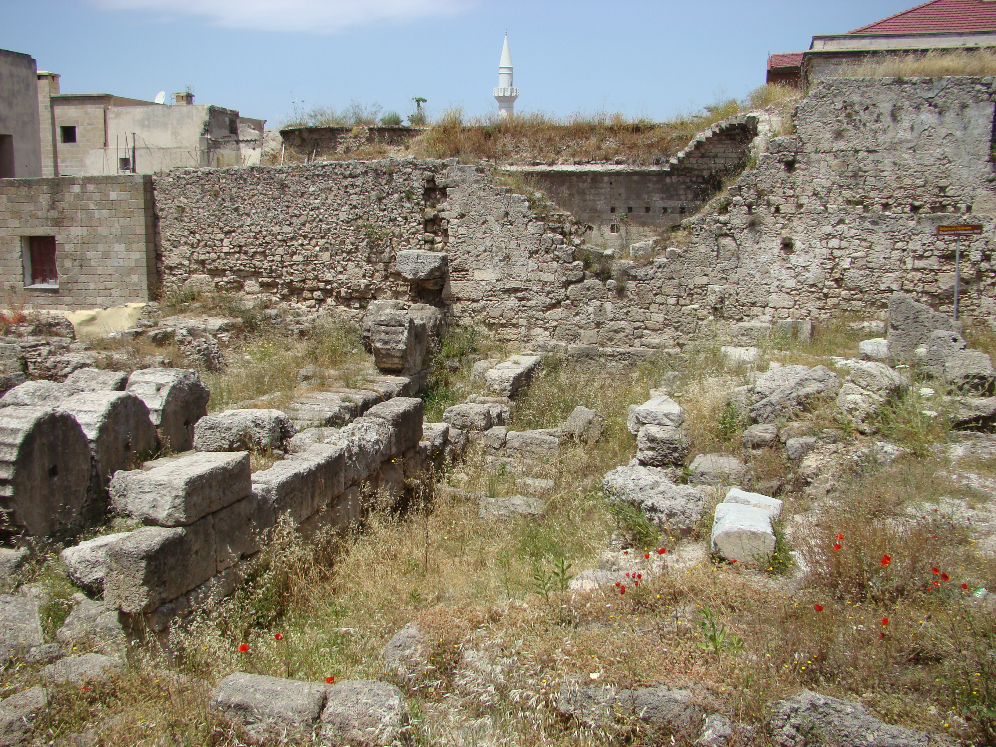 Überreste aus der Antike in Rhodos (Stadt)